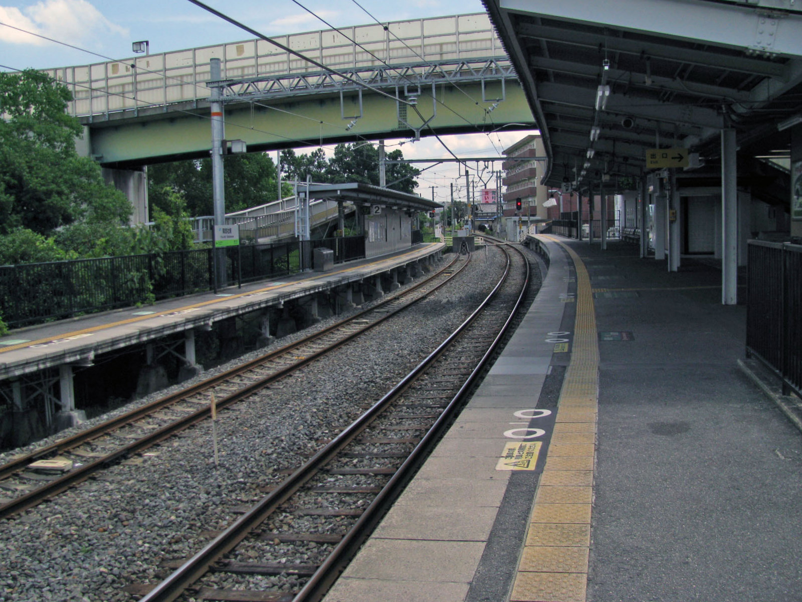 JR学研都市線同志社前駅